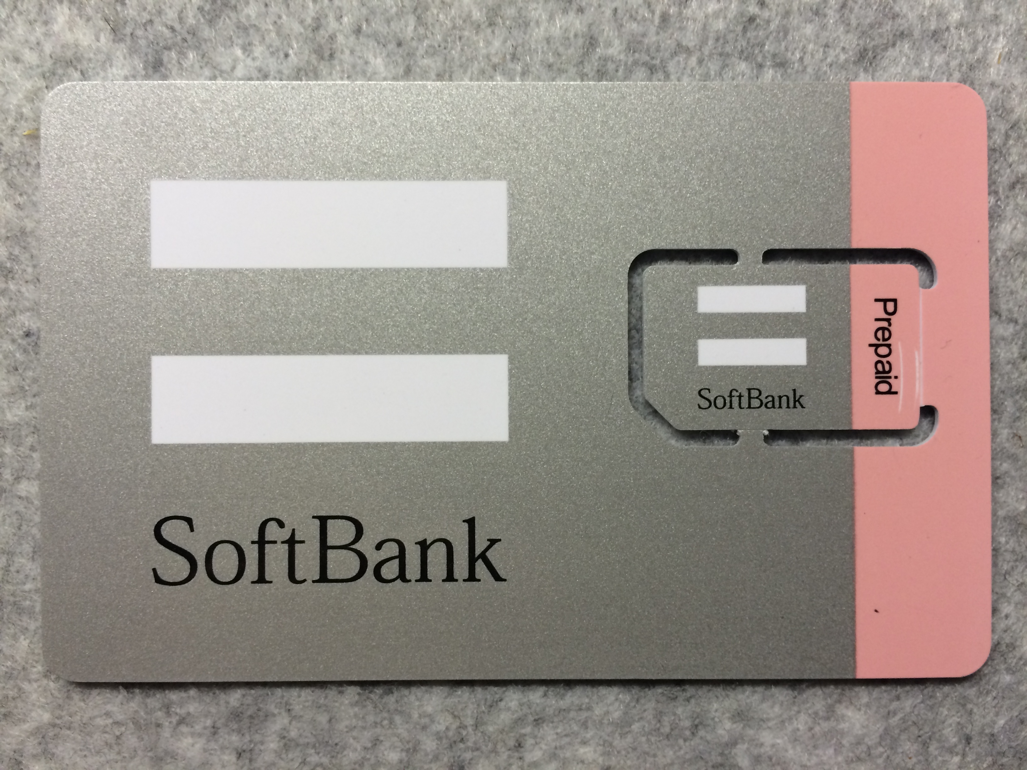 ソフトバンクモバイル「プリスマ」用標準USIMカード